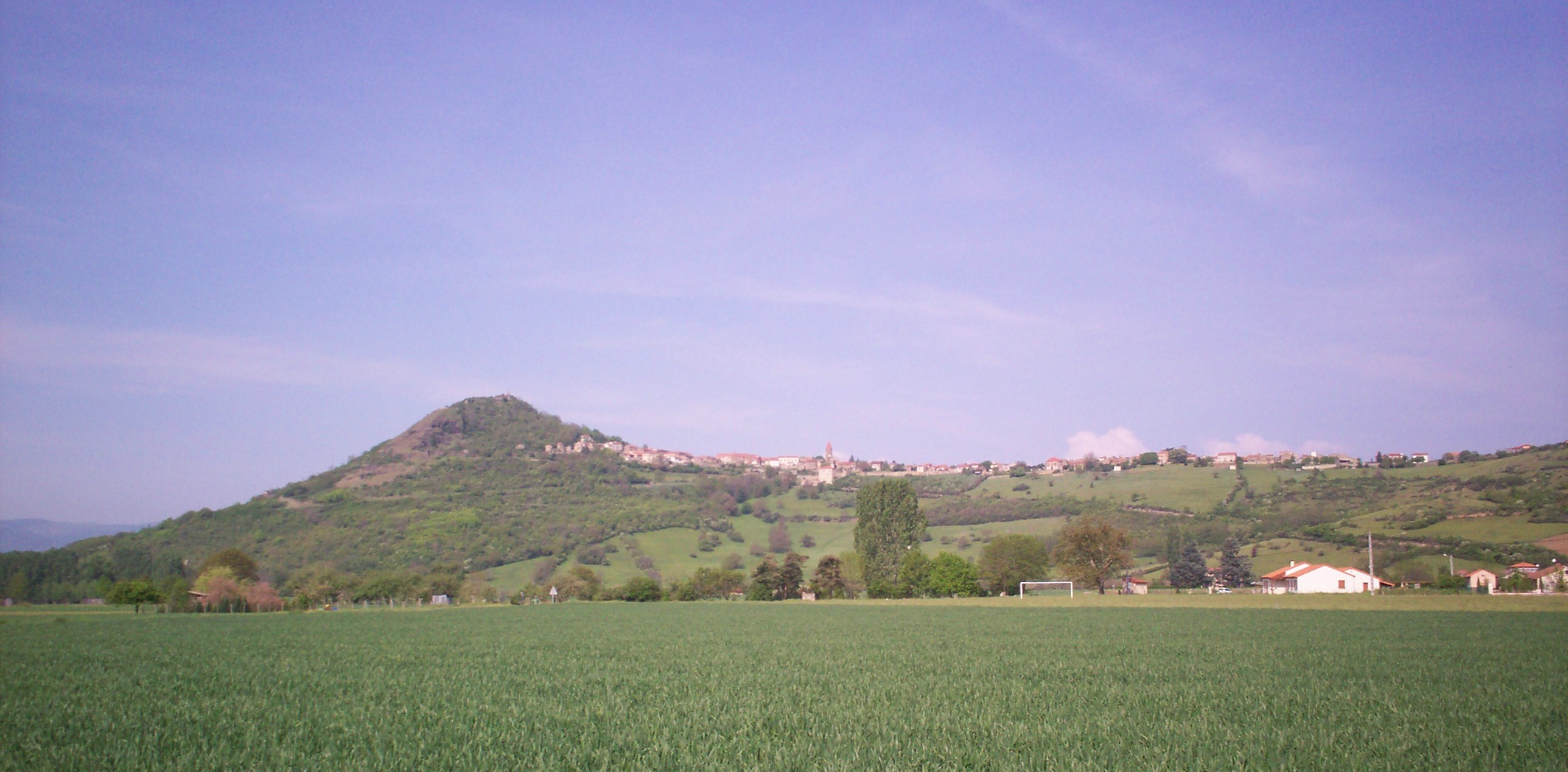 Fotografia personala liura de drech.